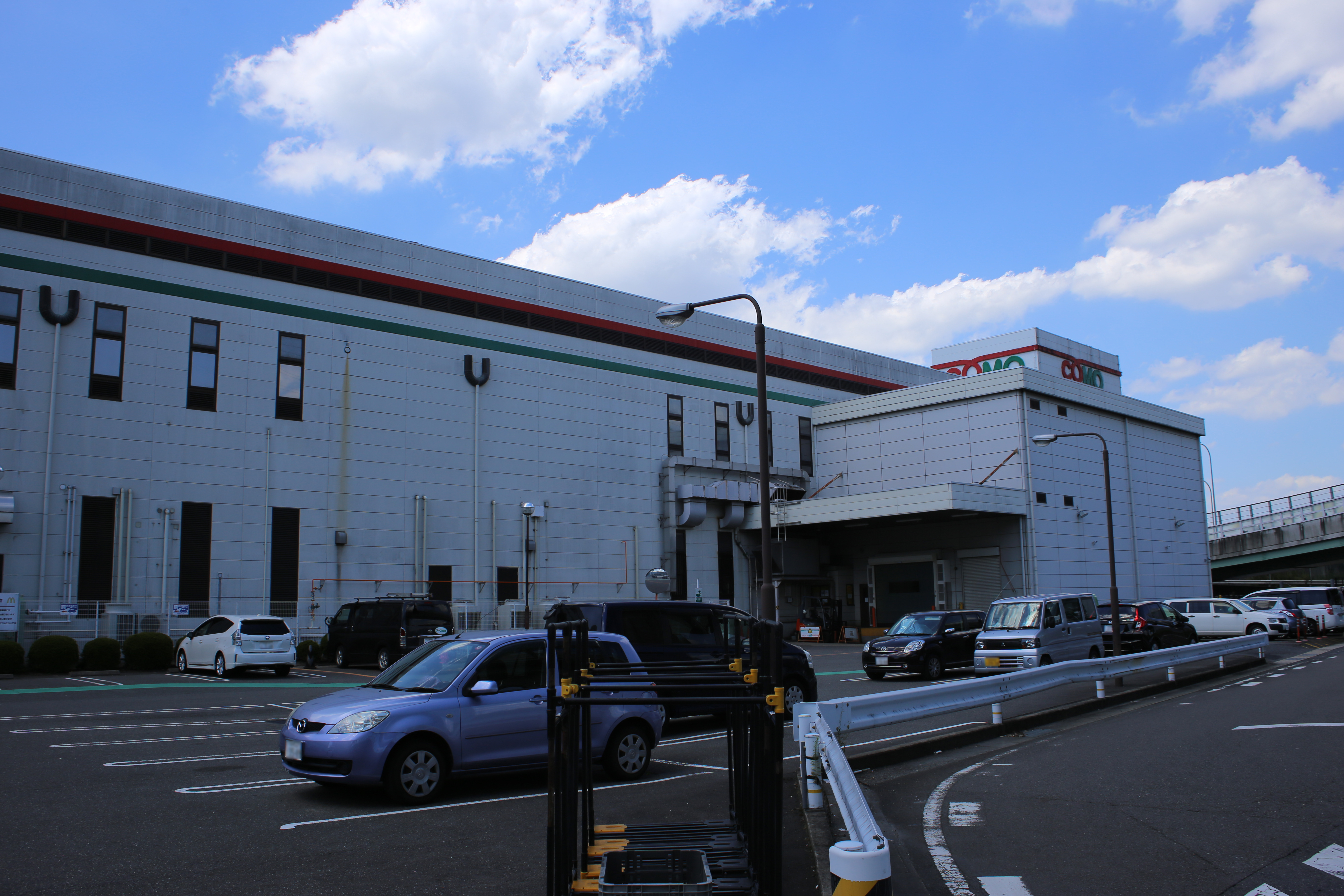 愛知県小牧市のコモ本社。ナンバープレートにつき、画像処理済。